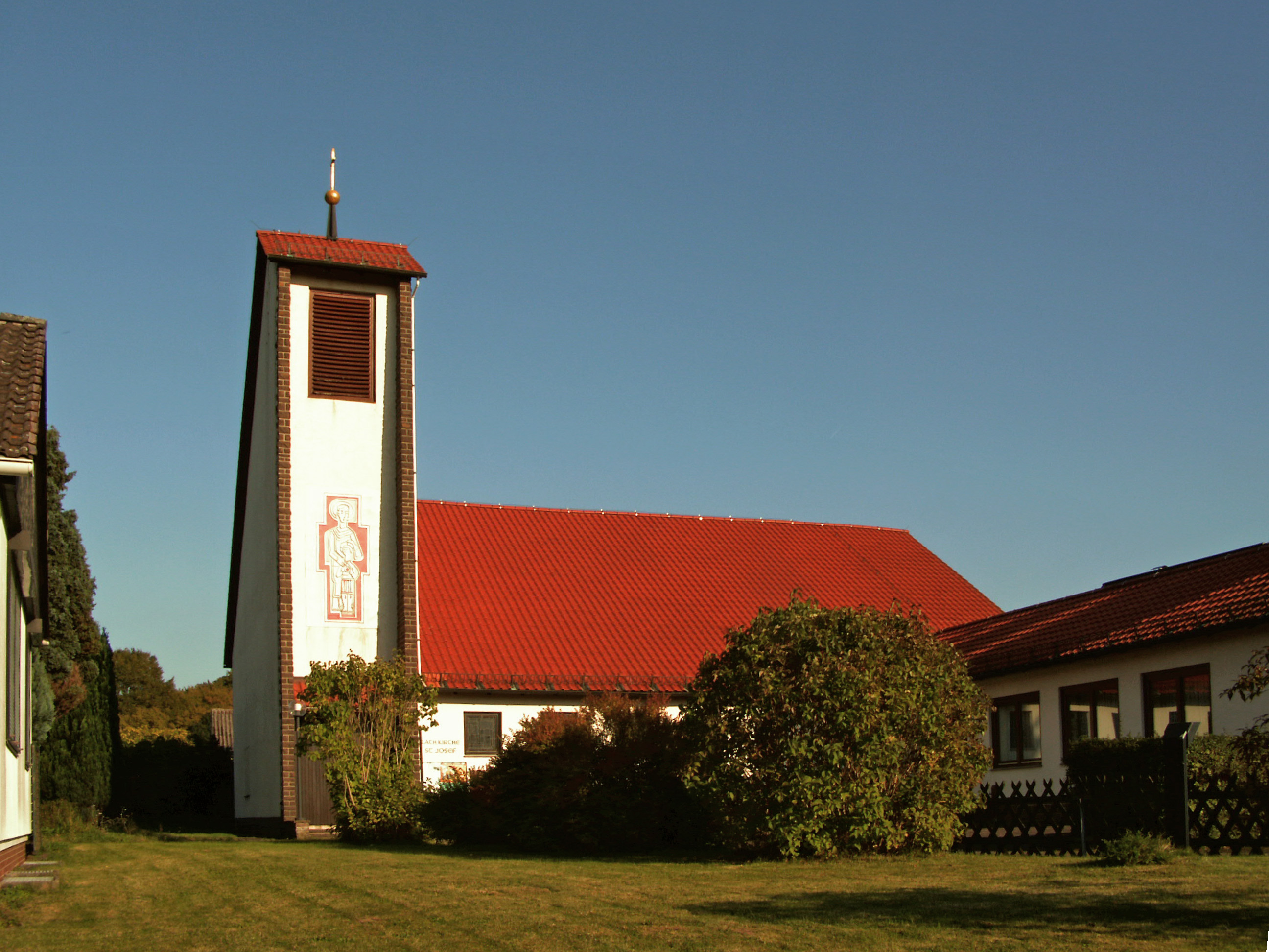 Katholische Kirche St. Joseph in Volpriehausen, Ortsteil von Uslar